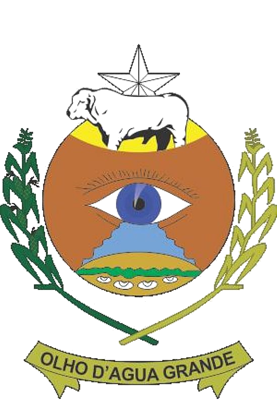 Brasão da cidade de Olho d'Água Grande, usado em sua página na wikipédia.